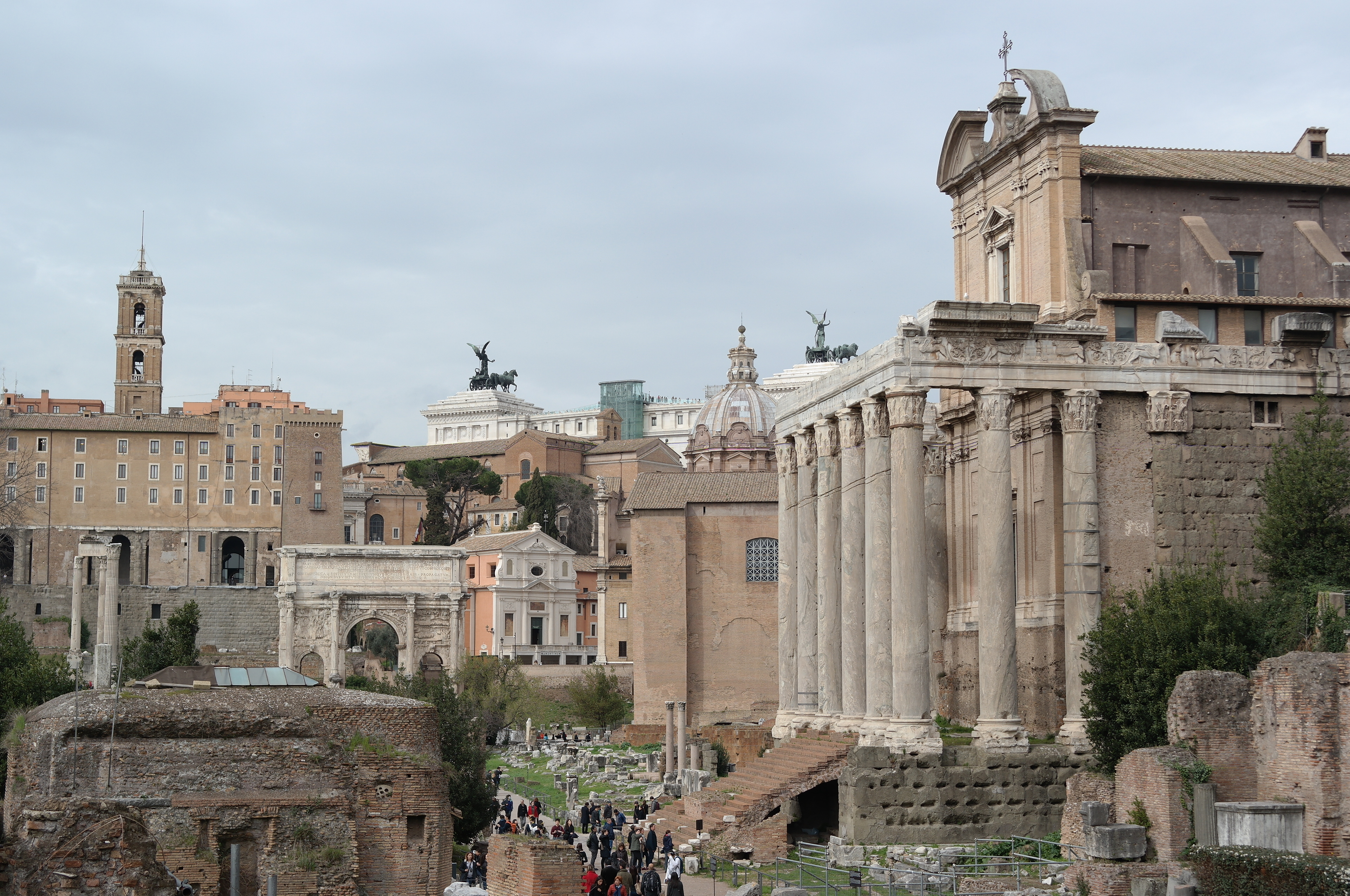 Veduta del Foro Romano: a destra, il Tempio di Antonino e Faustina, mentre sullo sfondo si notano l'Arco di Settimio Severo e la facciata della Chiesa di San Giuseppe dei Falegnami.